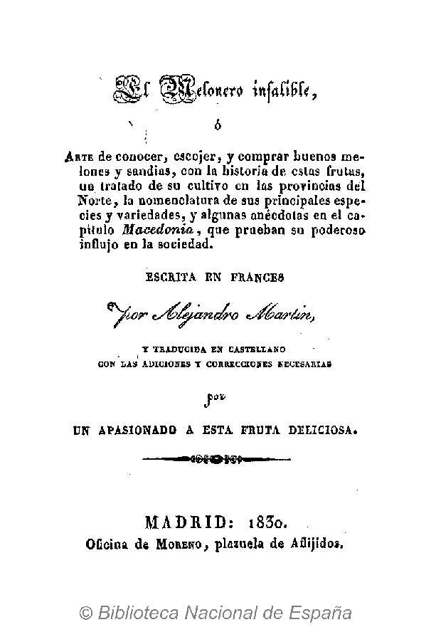 El melonero infalible, ó Arte de conocer, escojer, y comprar buenos melones y sandias : con la historia de estas frutas, un tratado de su cultivo en las provincias del Norte ... escrita en frances por Alejandro Martin ; y traducida en castellano con las adiciones y correcciones necesarias por un apasionado a esta fruta deliciosa Autor: Martin, Alexandre (n. 1795) Fecha: 1830 Datos de edición: Madrid, Oficina de Moreno, plazuela de Aflijidos